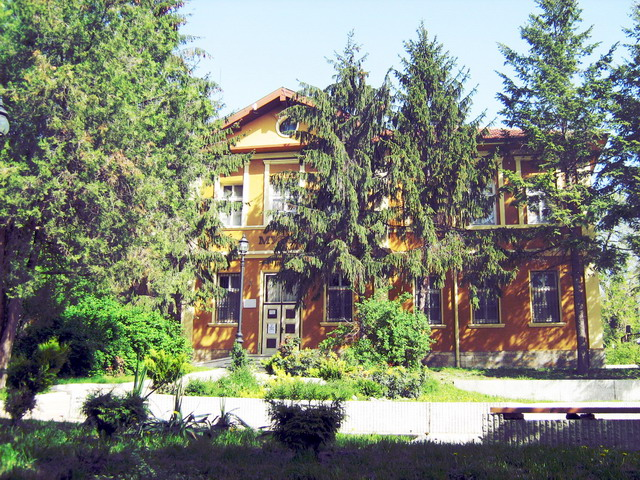 Историческият музей - Попово - април 2008 год. (Сградата му е построена през есента на 1883 год. първоначално за Околийско управление.) Фото: Вл. Стойков